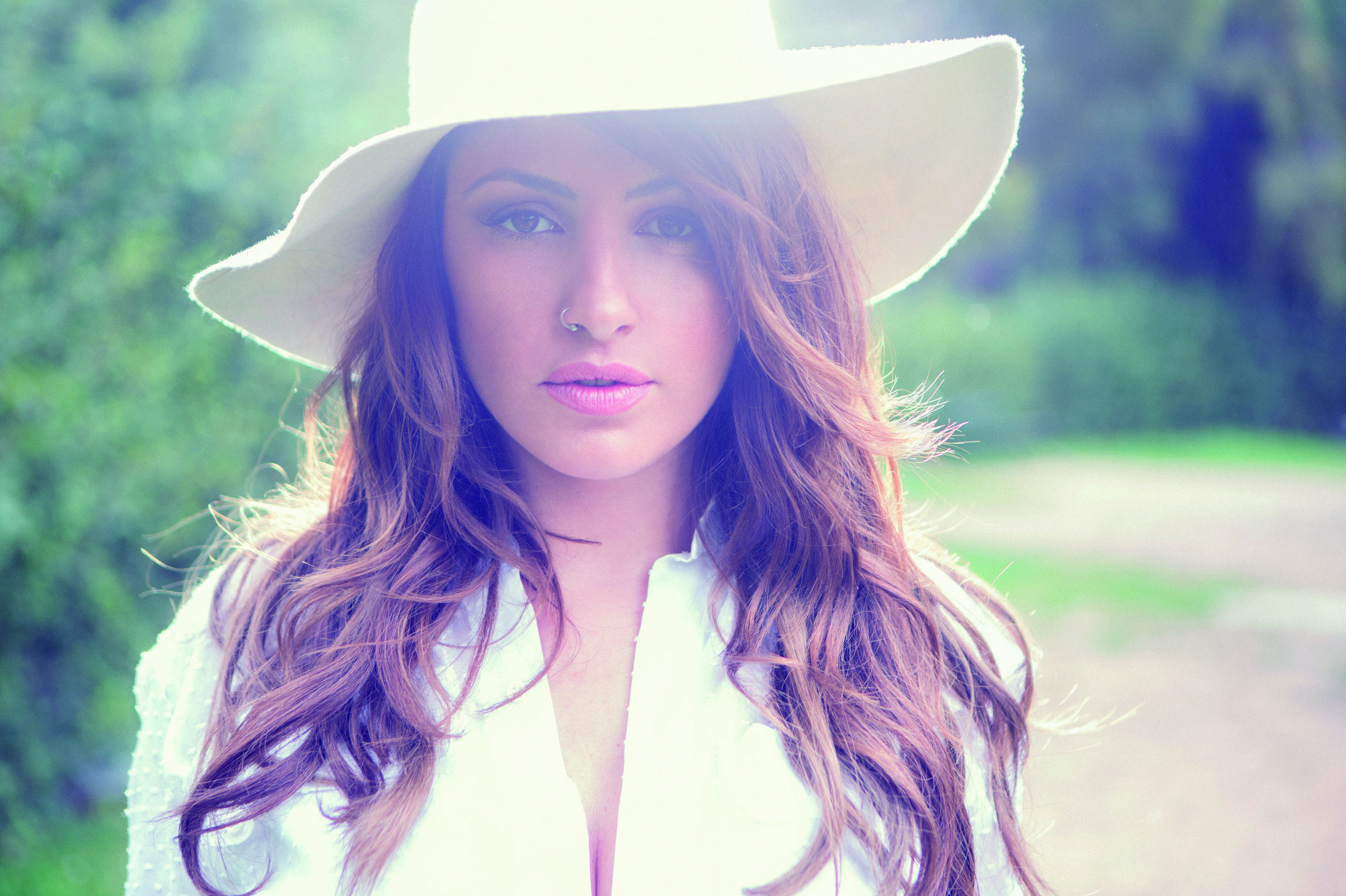 Den svensk-grekiska artisten Elena Paparizou.